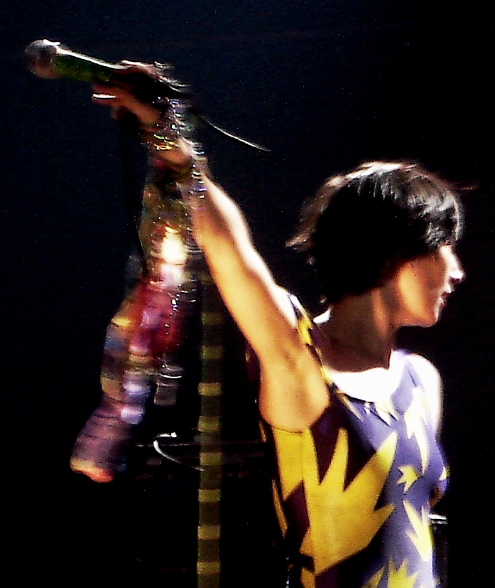 Karen O, singer from Yeah Yeah Yeahs, during Tim Festival, Brazil, São Paulo